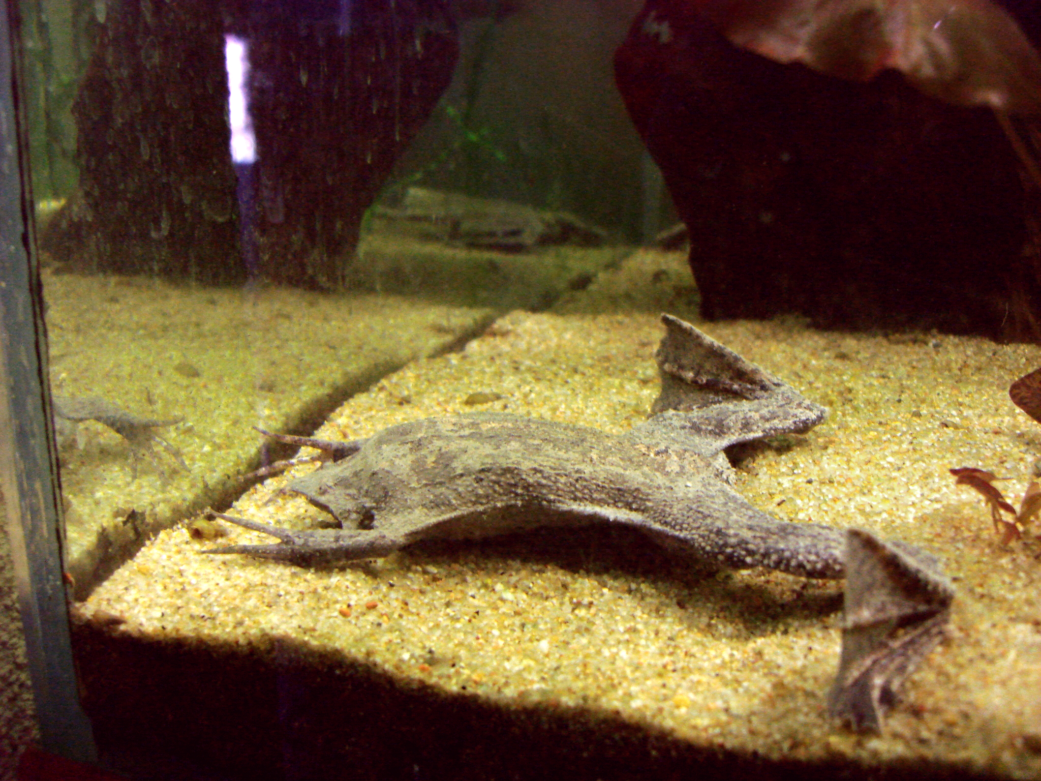 Pipa pipa